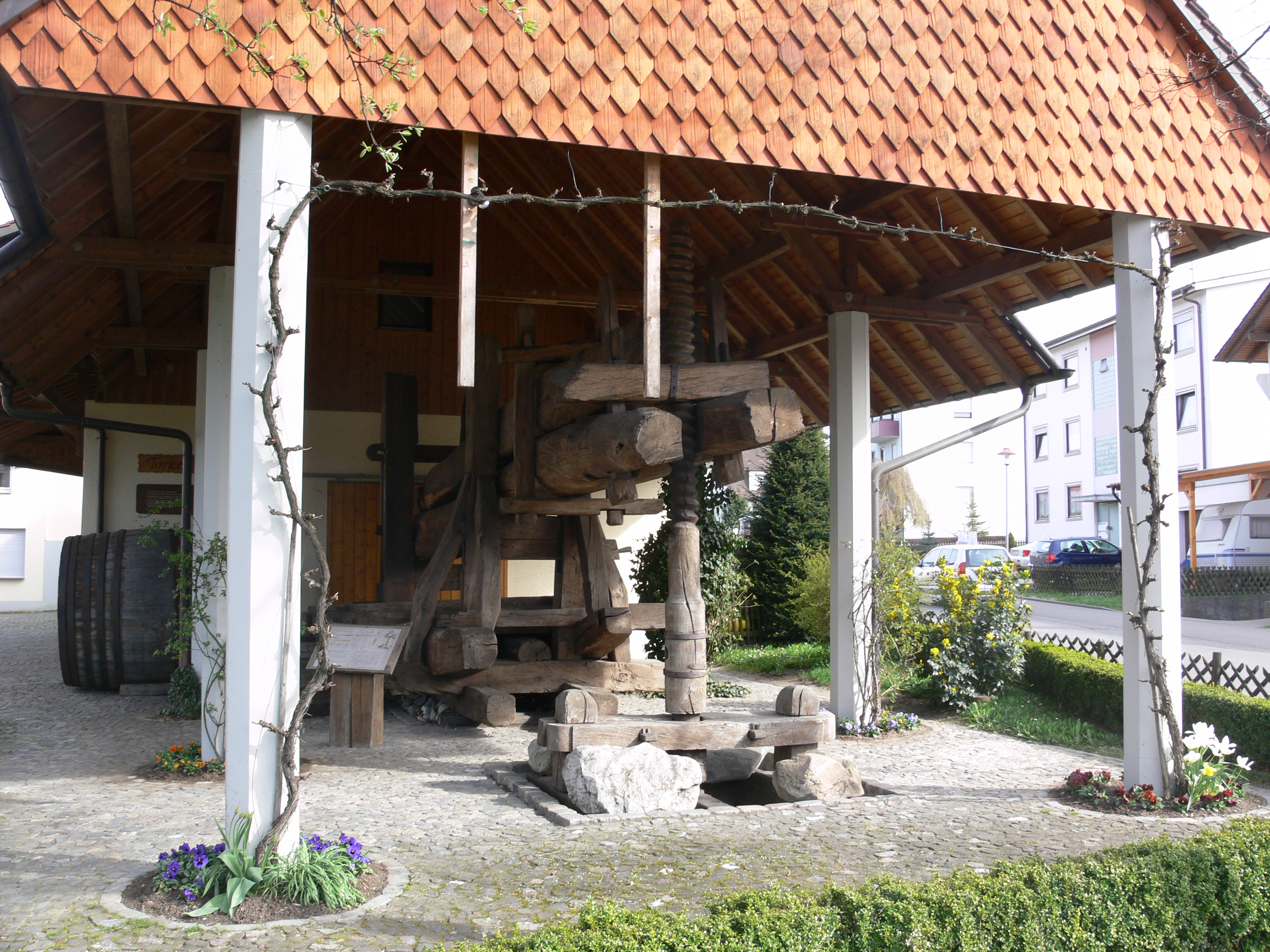 Bermatinger Torkel, Bermatingen, Bodenseekreis